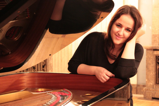 Српски (ћирилица): Сара Вујадиновић